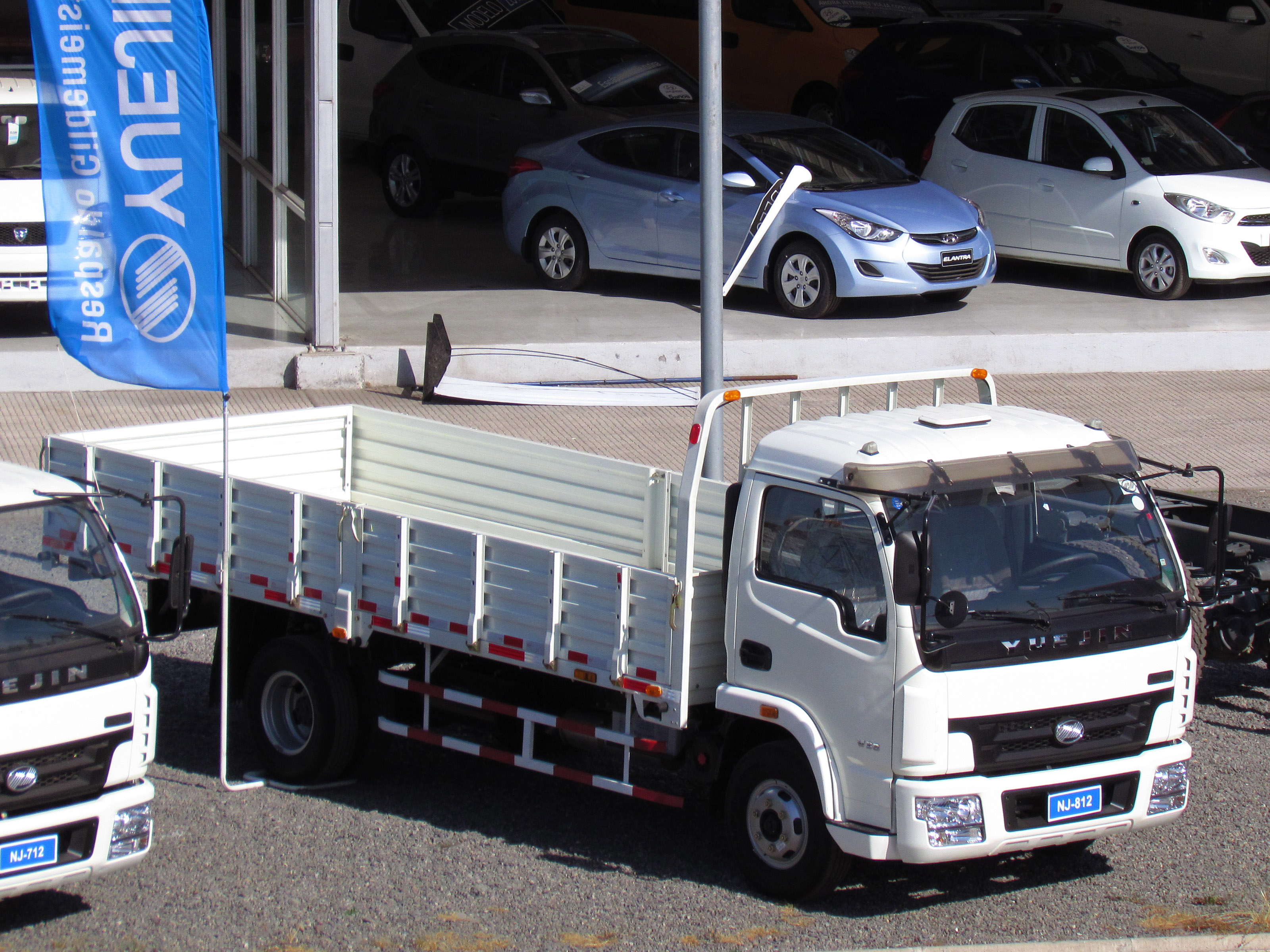 Yuejin NJ-812 2012